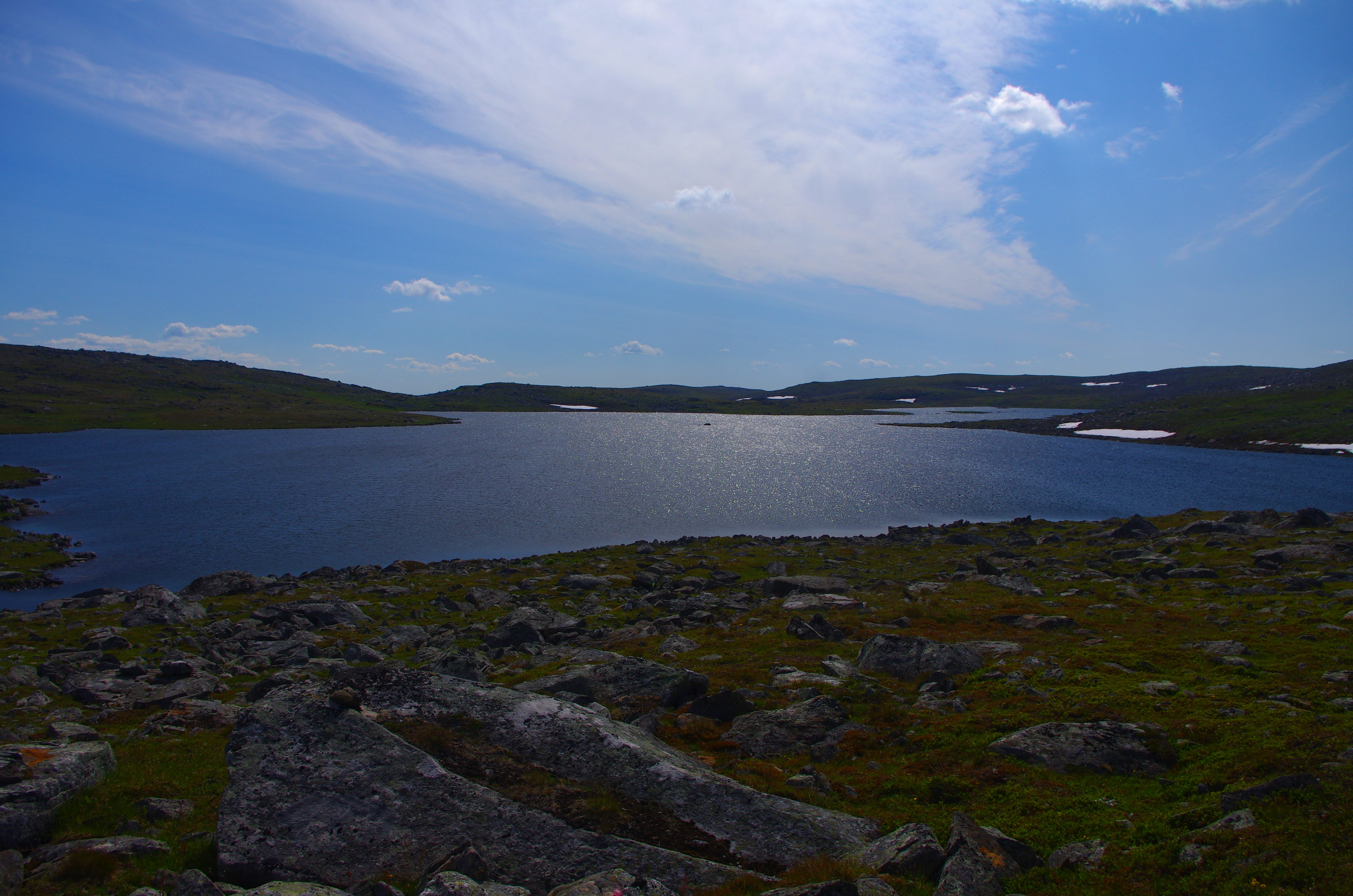 Guoutelisjaure är en sjö i Sorsele kommun i Lappland i Sverige. Kungsleden passerar sjön.